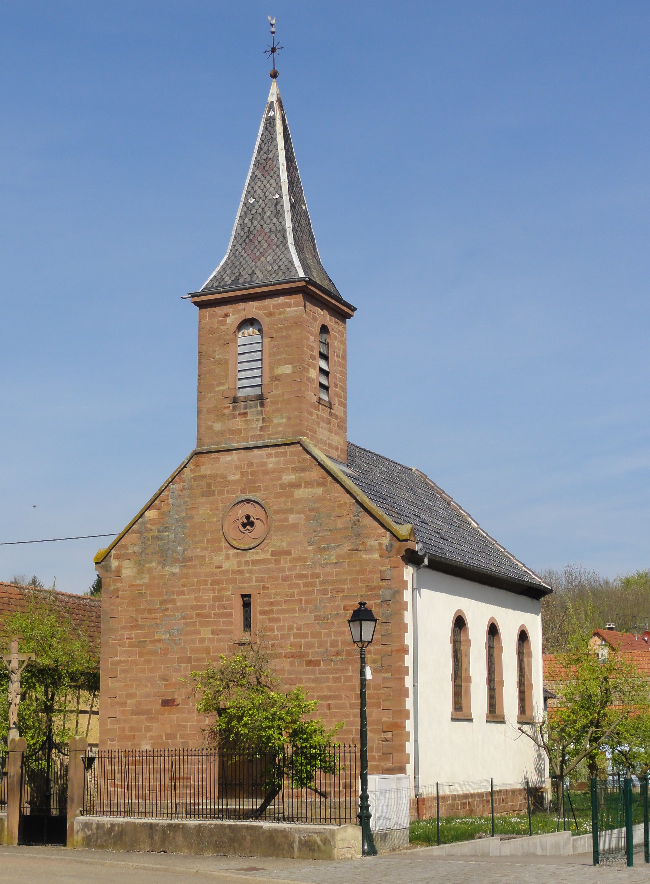 Alsace, Bas-Rhin, Wintzenheim-Kochersberg, Église Saint-Urbain (1902)